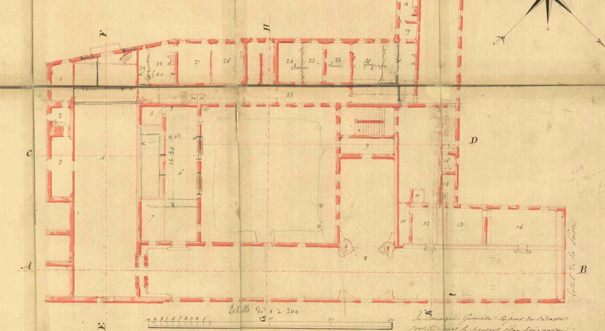 Plan du 2e étage du lycée de Grenoble. Étage abritant le musée-bibliothèque de Grenoble (1837). Légende : salle 1: bureau du conservateur, salle 2: cabinet, salle 3: petite salle musée, salle 4: salle principale musée, salle 8: bibliothèque municipale, salle 13: cabinet des Antiques, sale 14: salle de lecture . Le grand carré au centre est une cour intérieure. La rue Raoul-Blanchard est en bas et la rue Condillac en haut.